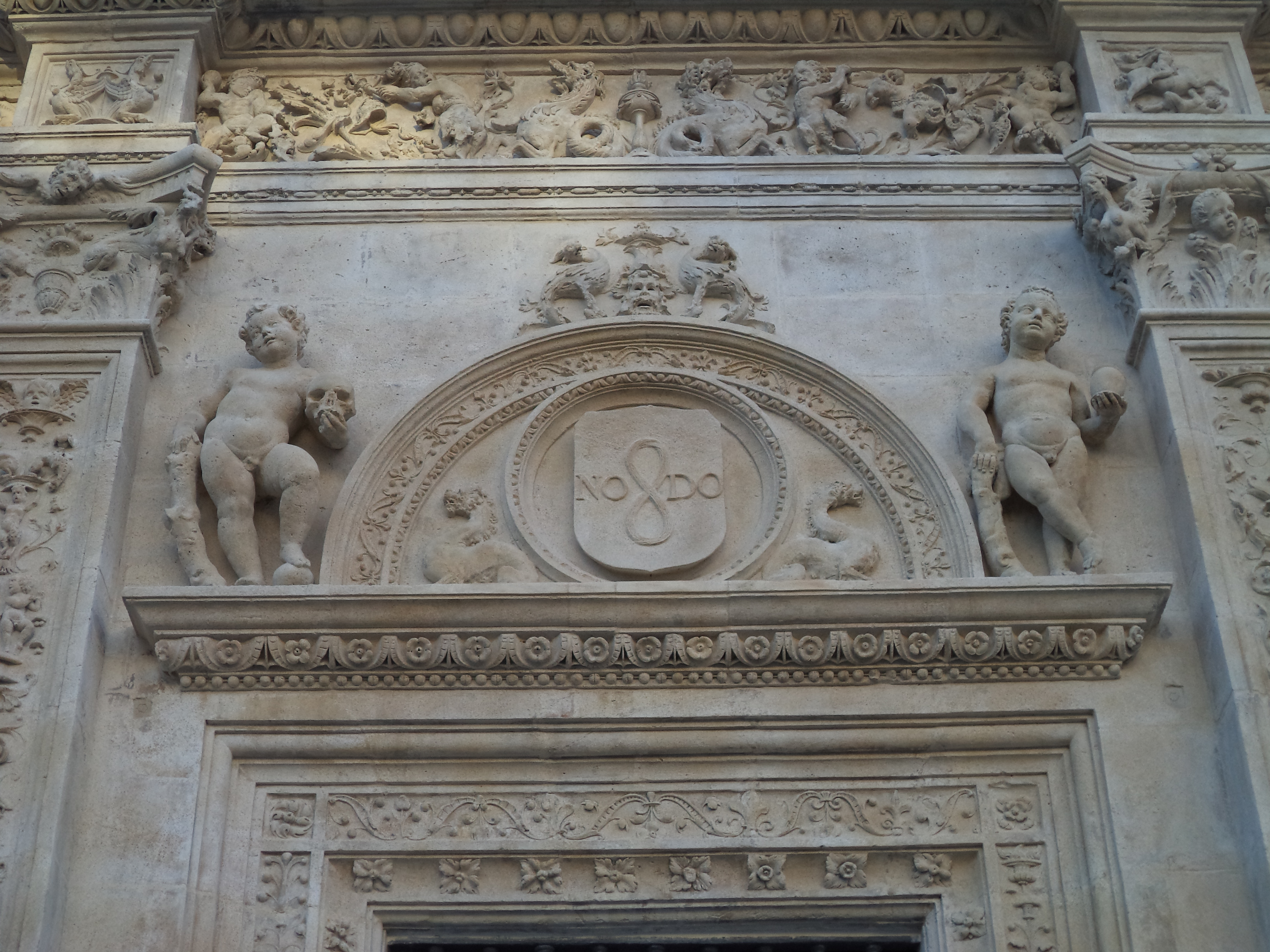 Uno de los NO8DO del Ayuntamiento sevillano, en la Plaza San Francisco. Las aves y cornucopias del relive próximo ahora son dragones y el rostro del jarrón se ha tornado más siniestro.